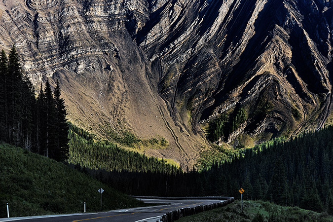 La Highway 40 à travers la Kananaskis Valley, en Alberta, Canada.